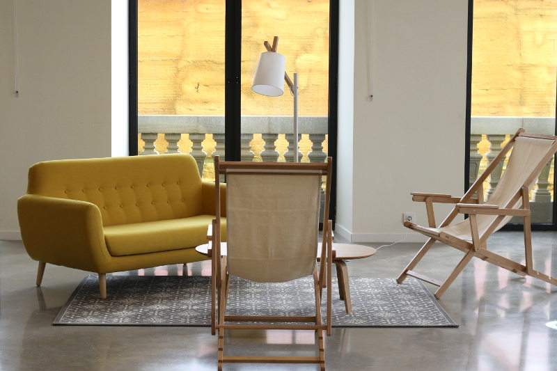 Ubik liburutegiko egongela